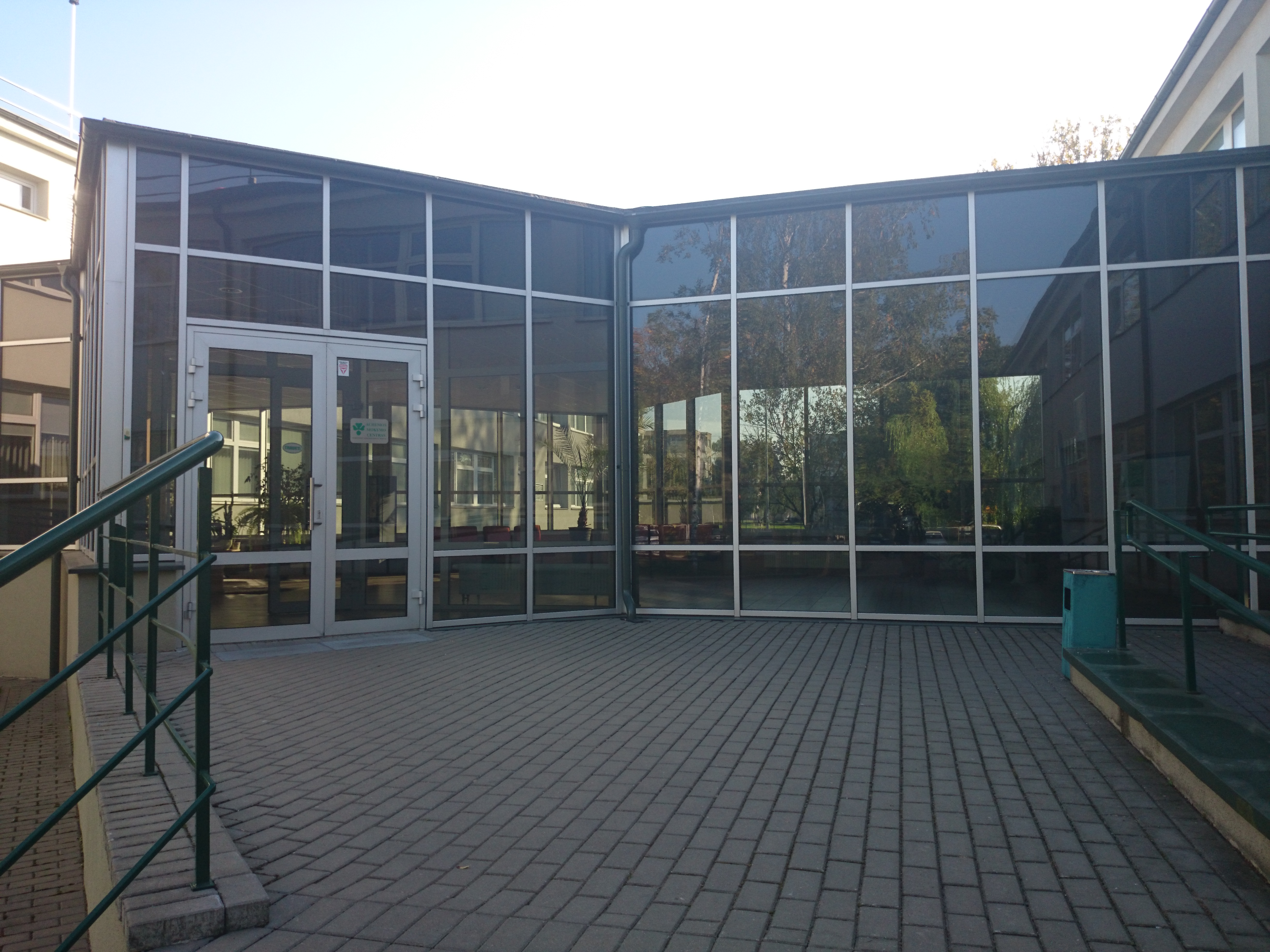 AchMC Jonava